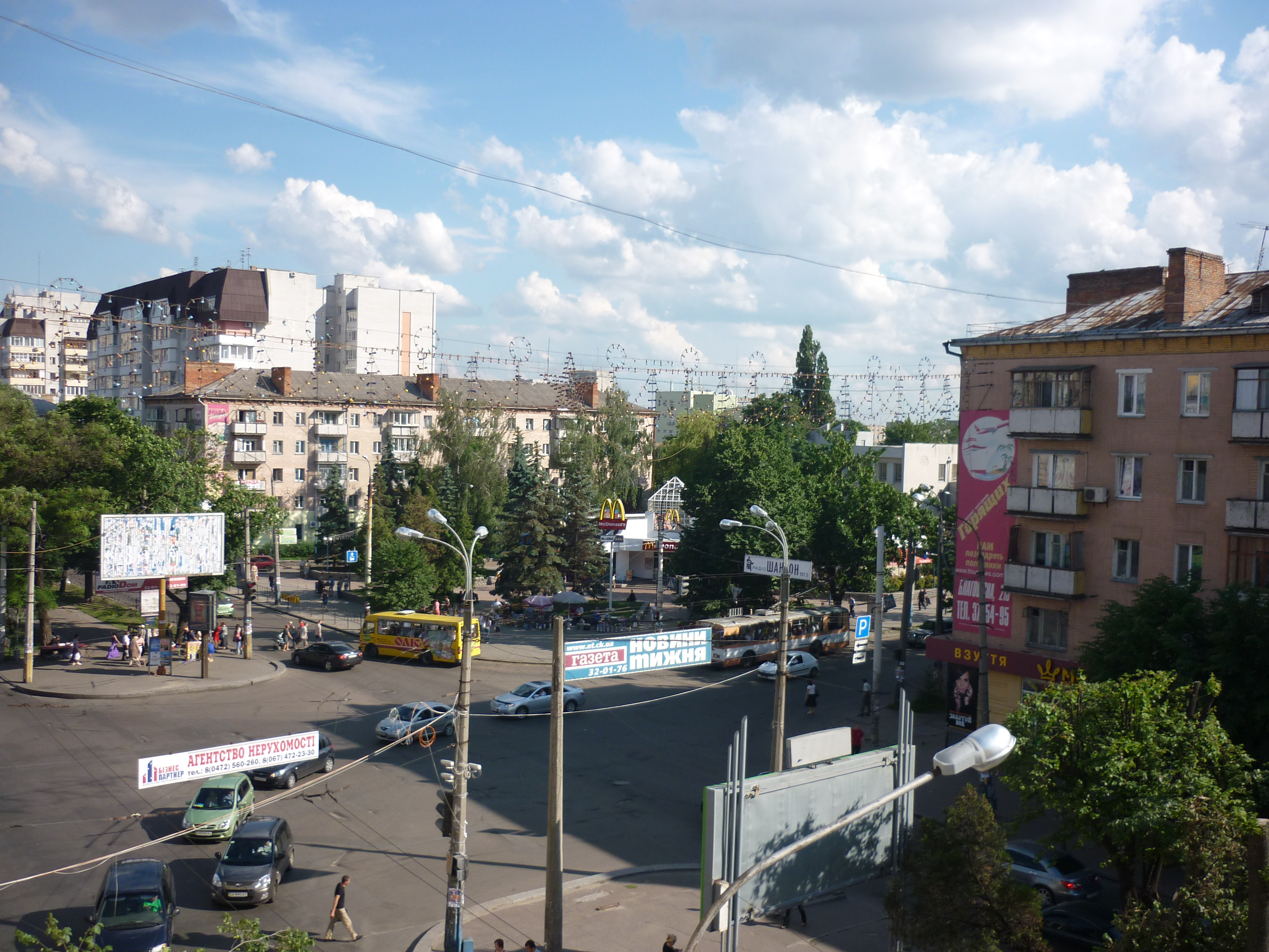 Центральна частина Черкас